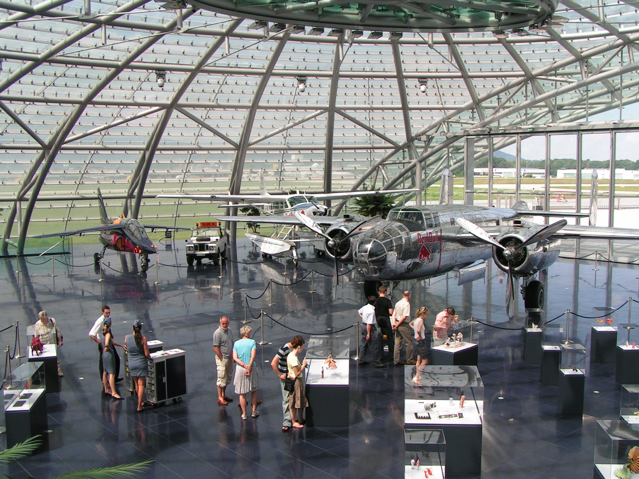 Hangar 7 beim Flughafen Salzburg: Gesamtüberblick